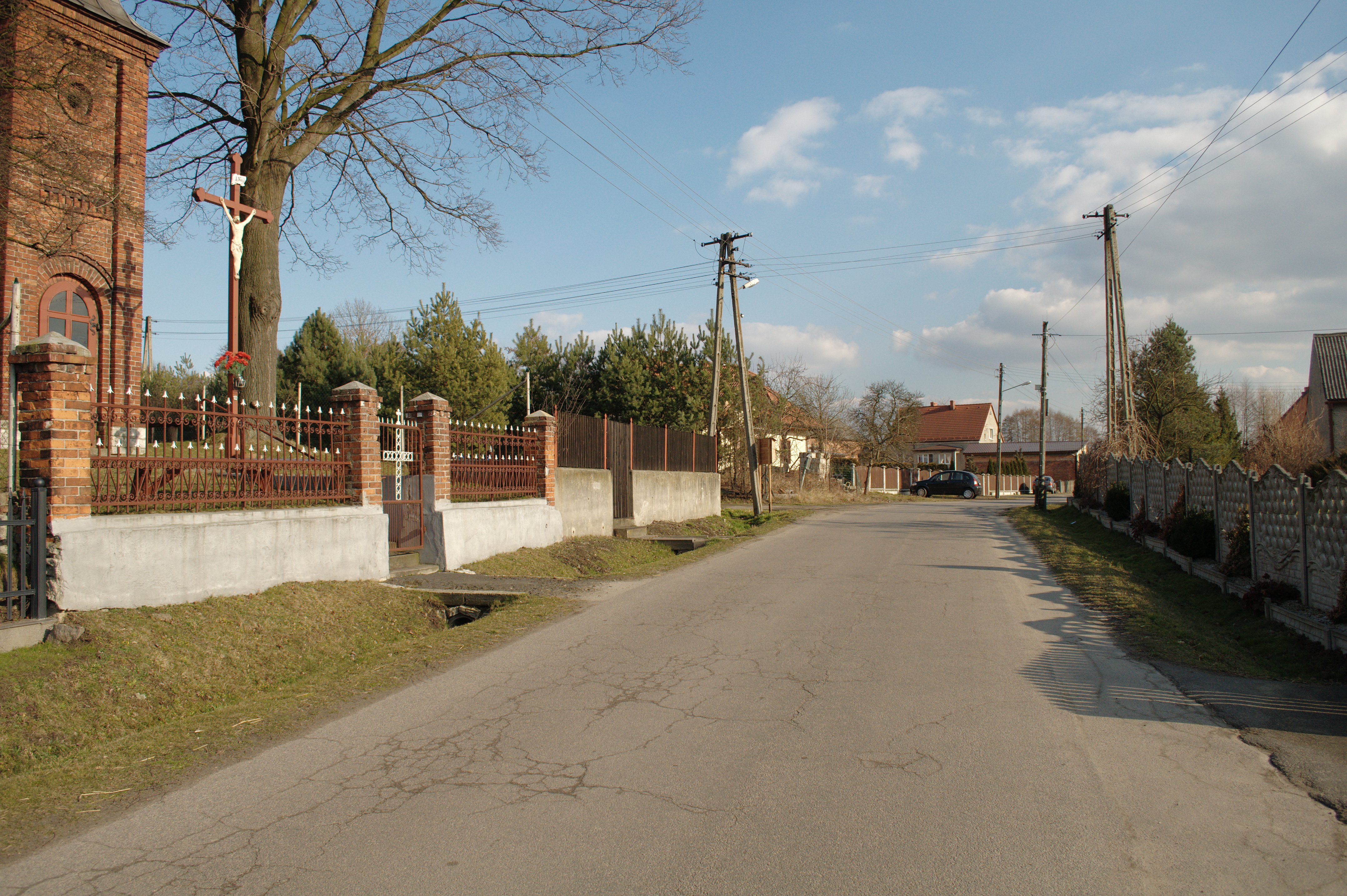 Łubki.